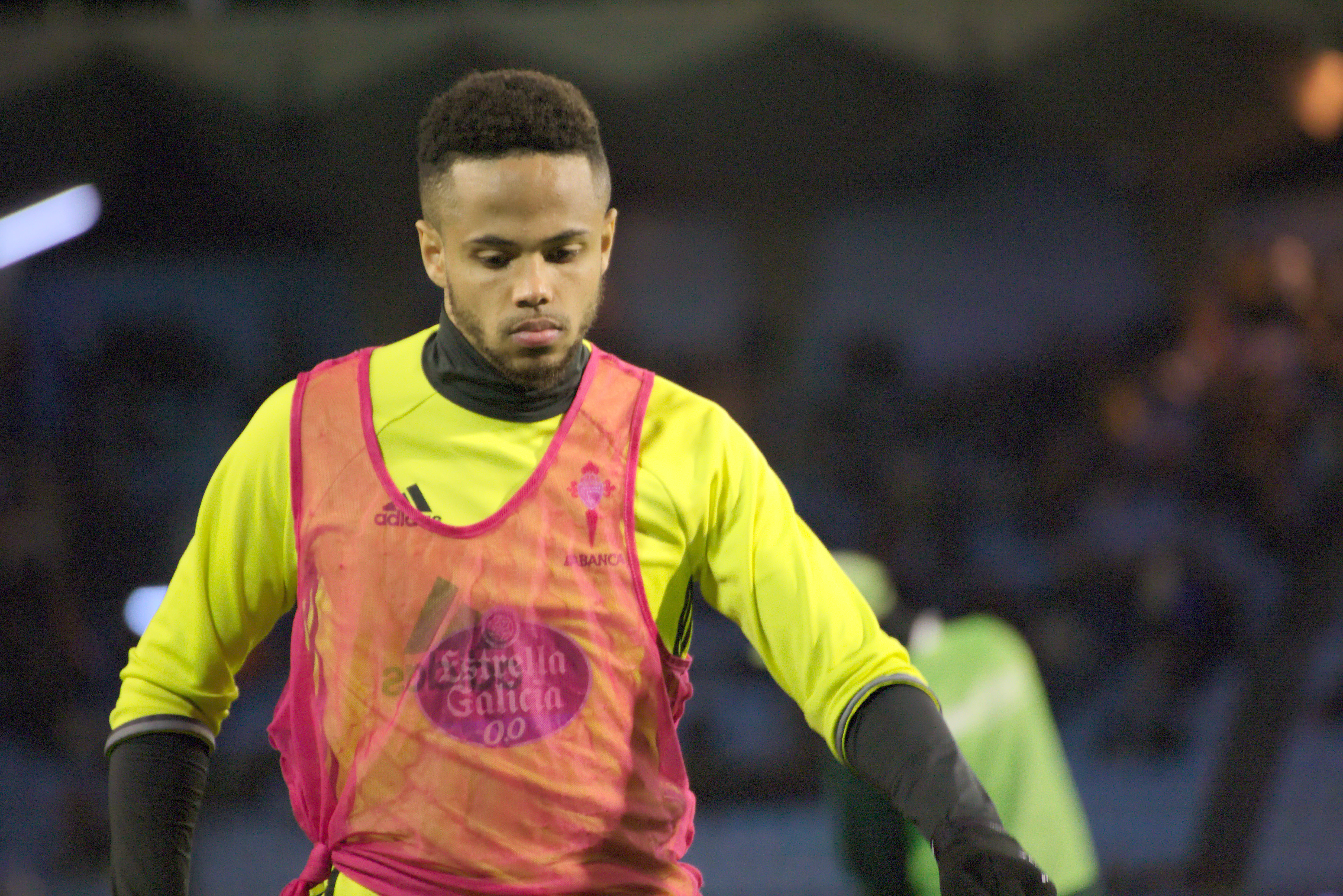 Théo Bongonda - Celta de Vigo